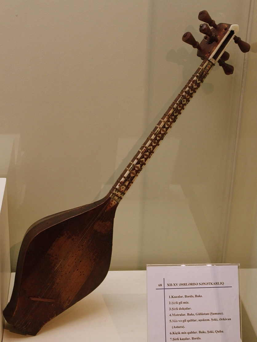 Çoğur musiqi aləti